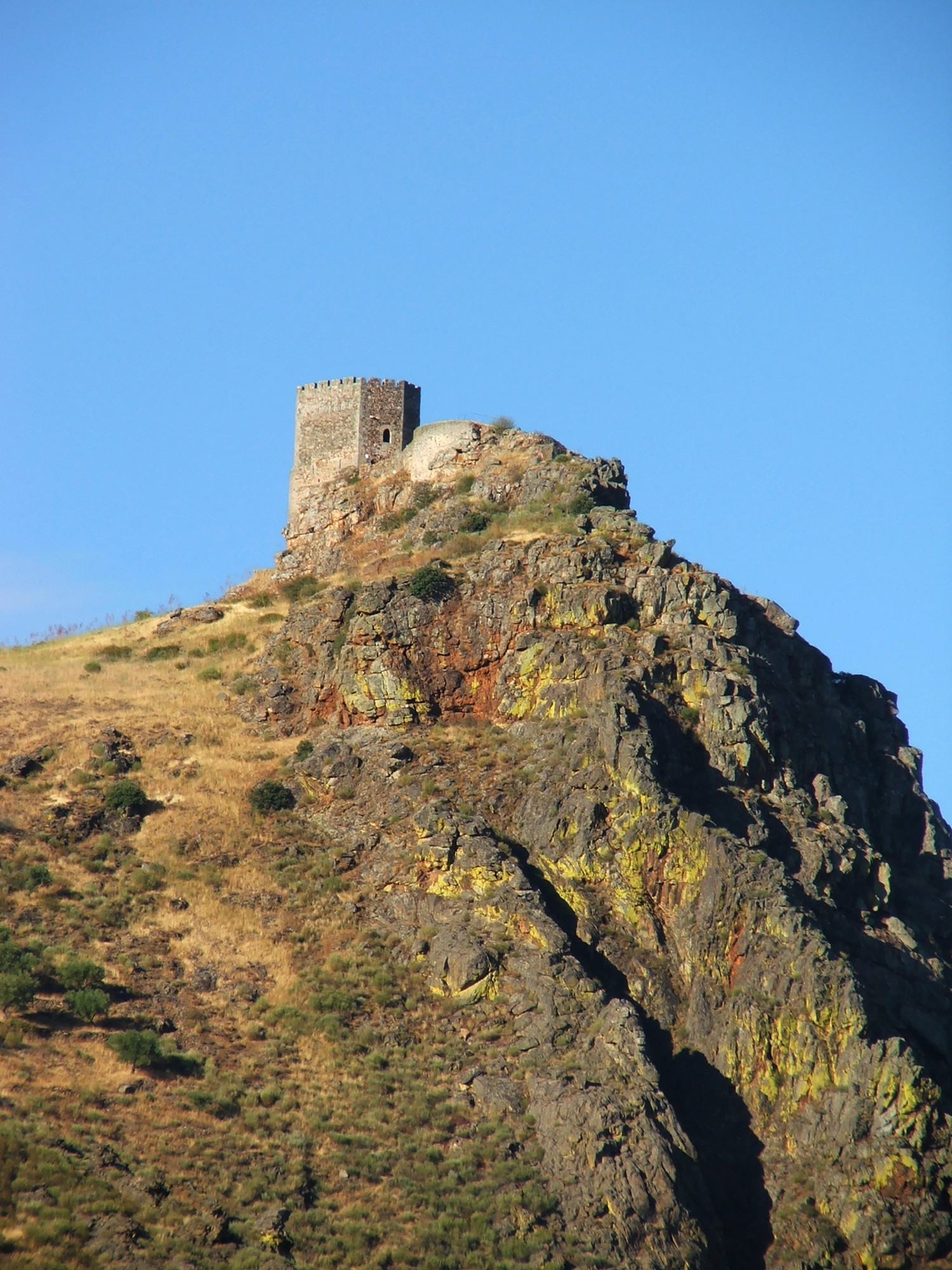 Alcantilado a cerca de 681 m de altitude, debruçado sobre o abismo onde corre o rio Angueiras e perto da confluência do rio Maçãs com este, o castelo de Algoso é um dos lugares obrigatórios para quem visite o Nordeste Transmontano. Para aqui chegar, tome a EN219 que de Mogadouro segue para Vimioso. Depois de passar a aldeia de Penas Roias e o que resta do seu castelo (merece a visita), surge numa curva da estrada a espectacular visão do pequeno castelo suspenso no alto do monte da Penenciada. Edificado no séc. XII por Mendo Rufino e mais tarde pertença da Ordem do Hospital, teve um papel relevante aquando da Guerra dos Sete Anos, quando em 1710 foi atacado pelos espanhóis e conseguiu resistir à ocupação. Além do interesse do próprio monumento, a paisagem que daqui se pode disfrutar é verdadeiramente impressionante. Embora esta também seja observável a partir do interior do castelo, existe um local onde as sensações podem ser mais fortes. Não aconselhável a quem sofra de vertigens, a crianças e a idosos, a todos os outros se pede muita atenção e um cuidado redobrado. Junto ao caminho que vai desembocar na entrada do castelo, siga um pequeno trilho pela direita, o qual vai contornando o recinto. Depois de passar por algumas fragas, aproxime-se cada vez mais do abismo mantendo o máximo cuidado. Atrás de si está a imensa massa rochosa onde assenta o castelo. Aos seus pés está um cenário de cortar a respiração. O rio Angueiras corre revolto em sucessivas pequenas quedas, a montante uma velha ponte subsiste e a jusante é perfeitamente visivel o moderno viaduto da EN219 . É sem dúvida um lugar impressionante e de uma beleza singular. This file was uploaded for Wiki Loves Monuments in Portugal with the unique identifier 74124.